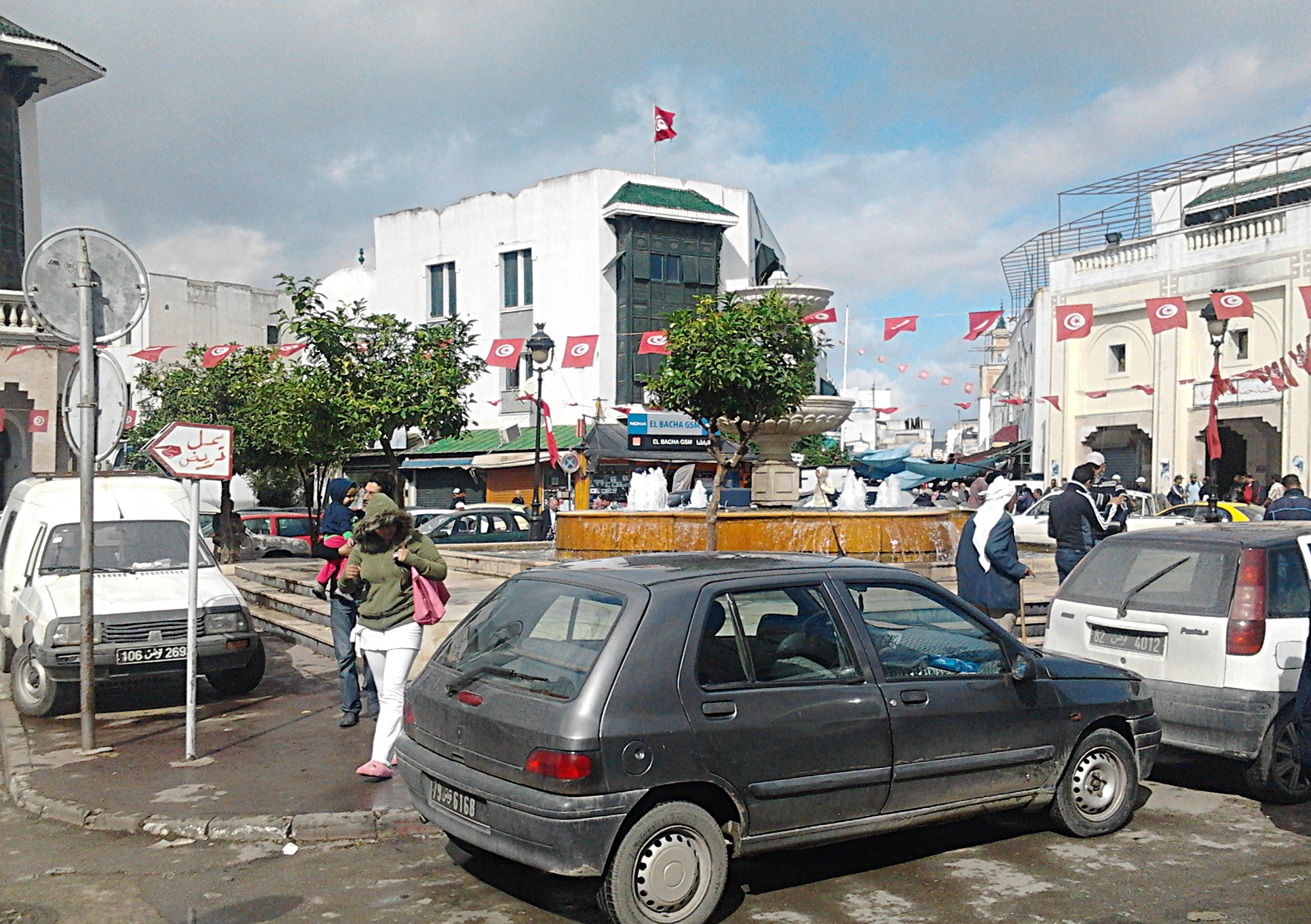 Bab Souika - Tunis (Au fond à droite on voit le local de la ligue de protection de la révolution ex local du RCD incendié en 1991 et pendant la révolution de janvier 2011)